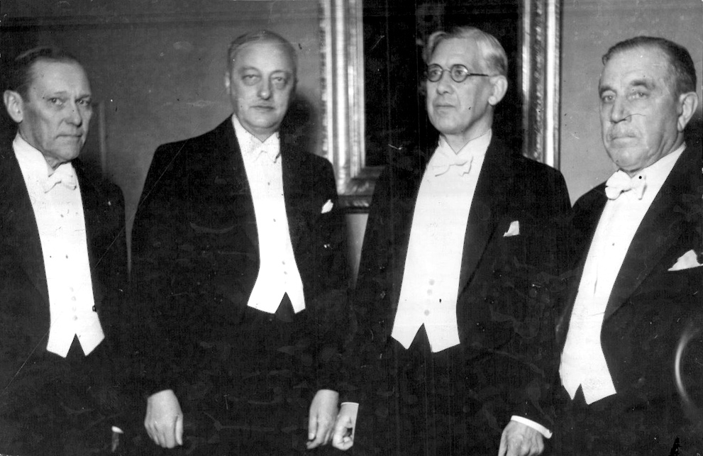 Juridiska föreningen. Från vänster juristprofessorerna F. Wetter, Åke Holmbäck, Phillips Hult och Thore Engströmer. Professor Hult är nuvarande ordförande och de övriga ha suttit ordförande.